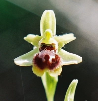 Ophrys araneola, détail de la fleur. Photo prise au Pic Saint Loup, mi-mai 2004